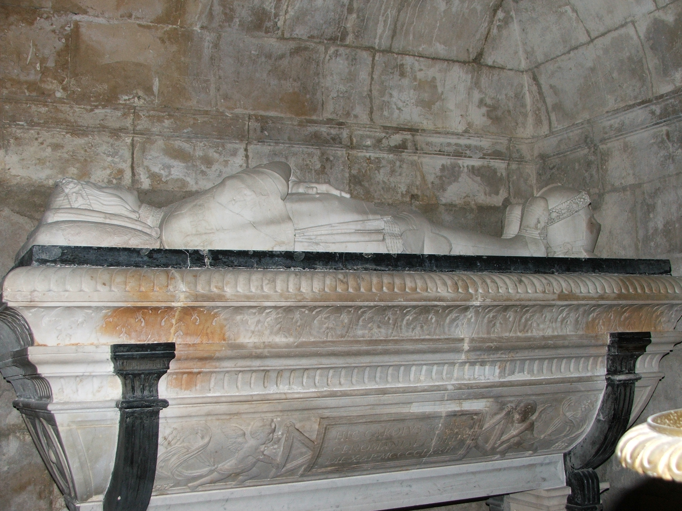 Le bas-relief sur le sarcophage consiste en une tablette ansée (tabula ansata), portée par deux putti, sur laquelle est inscrit en latin : HIC CAROLVS COMES / CENOMANIAE OBIIT DIE X AP MCCCCLXXII : ici Charles comte du Maine s'en est allé, le 10 avril 1472